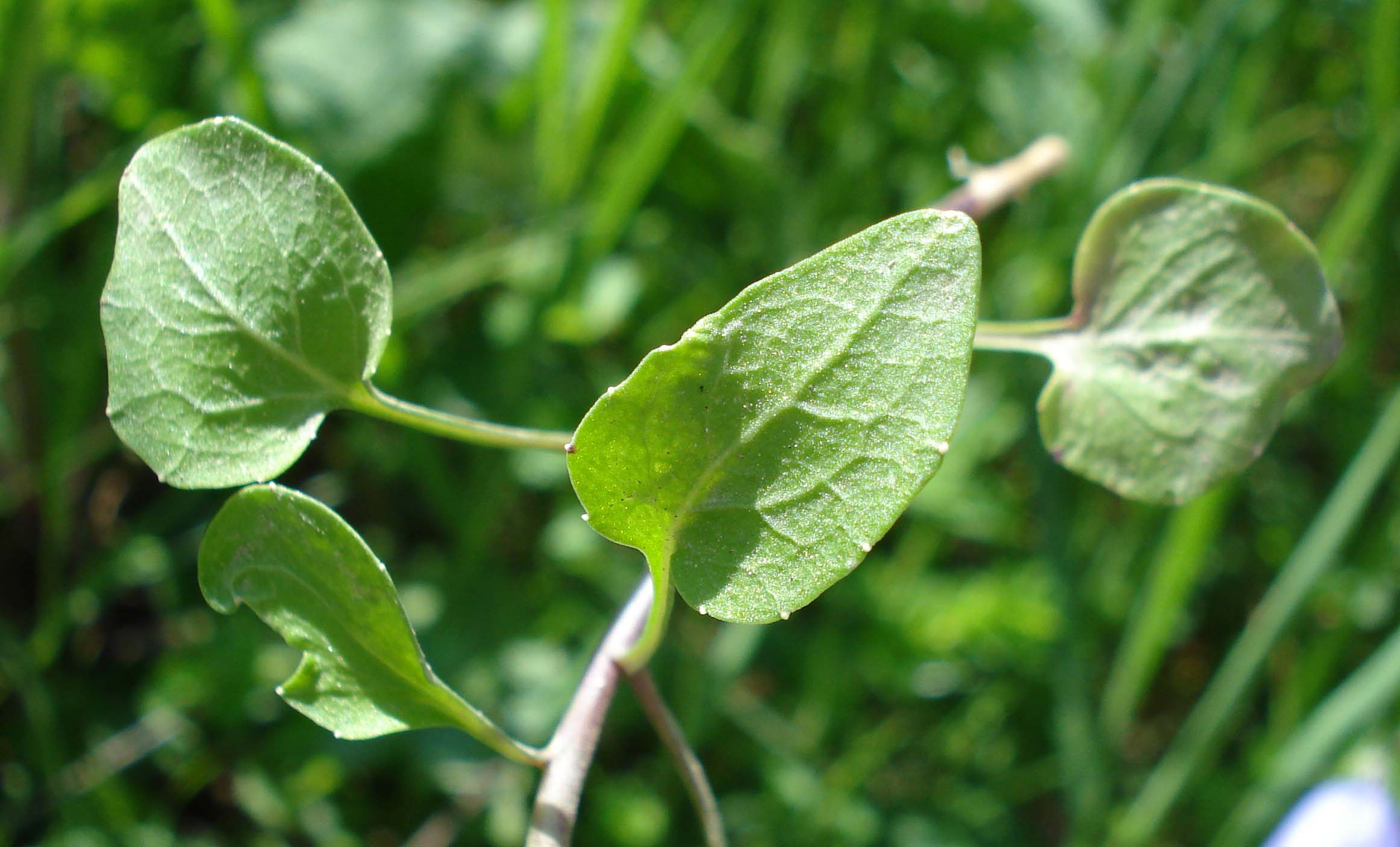 Campanula rotundifolia (Unterfranken, Germany)